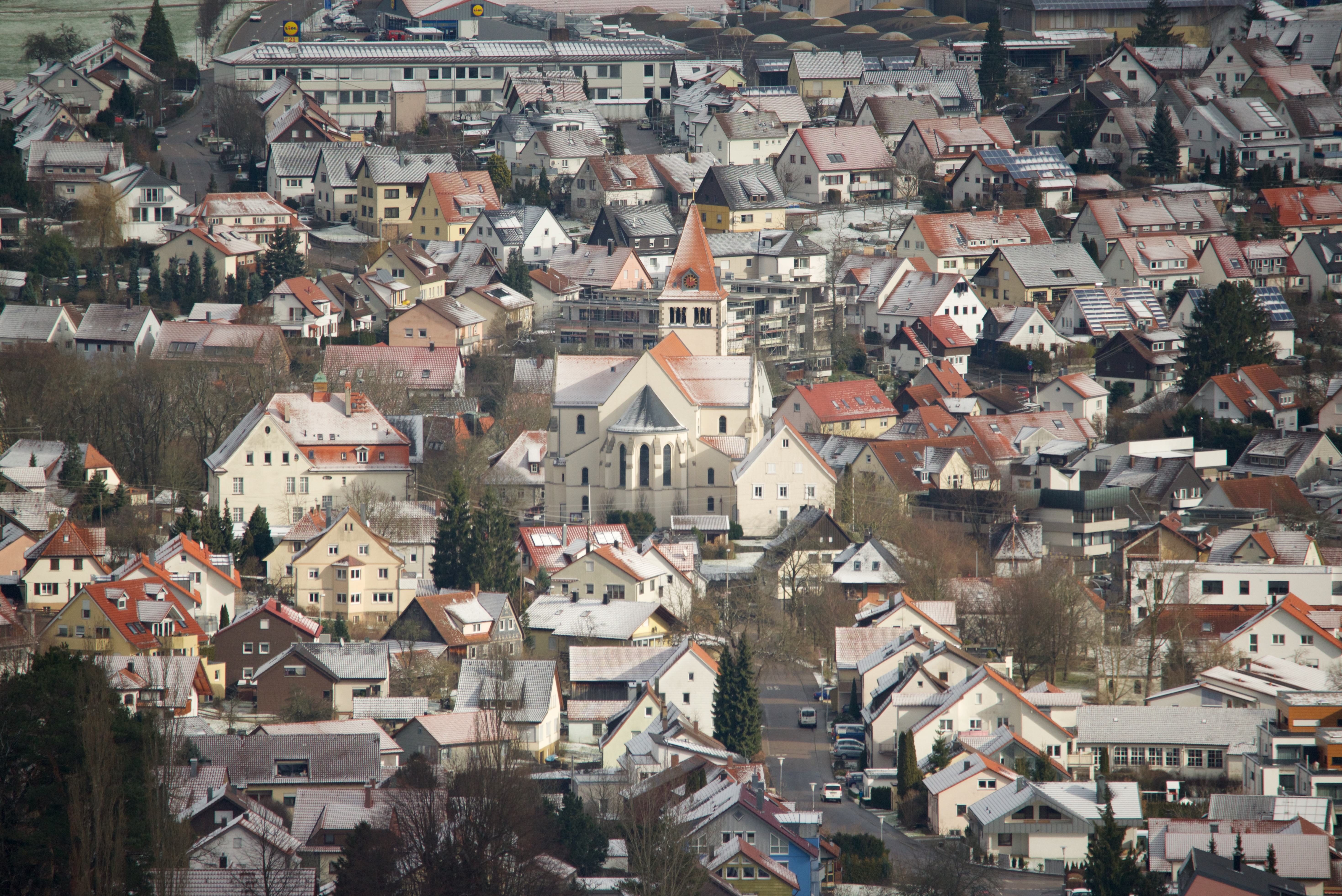 Der Ortskern mit Kirche von Waldstetten im Winter